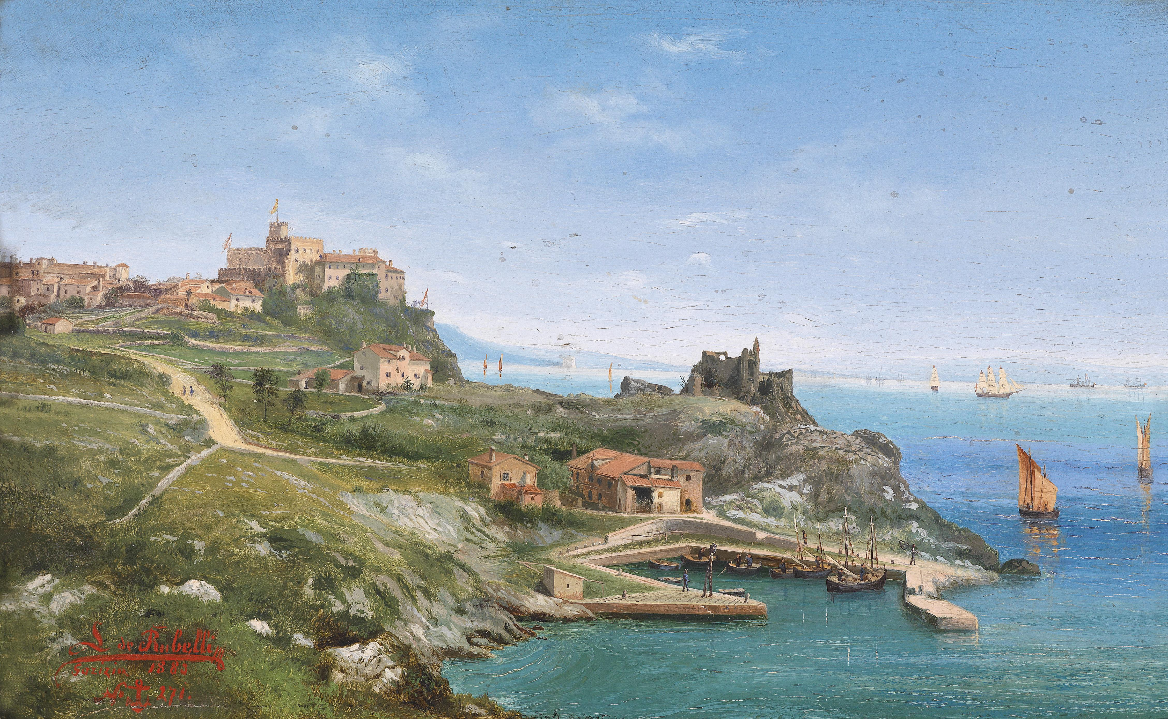 Castello de Duino, near Trieste